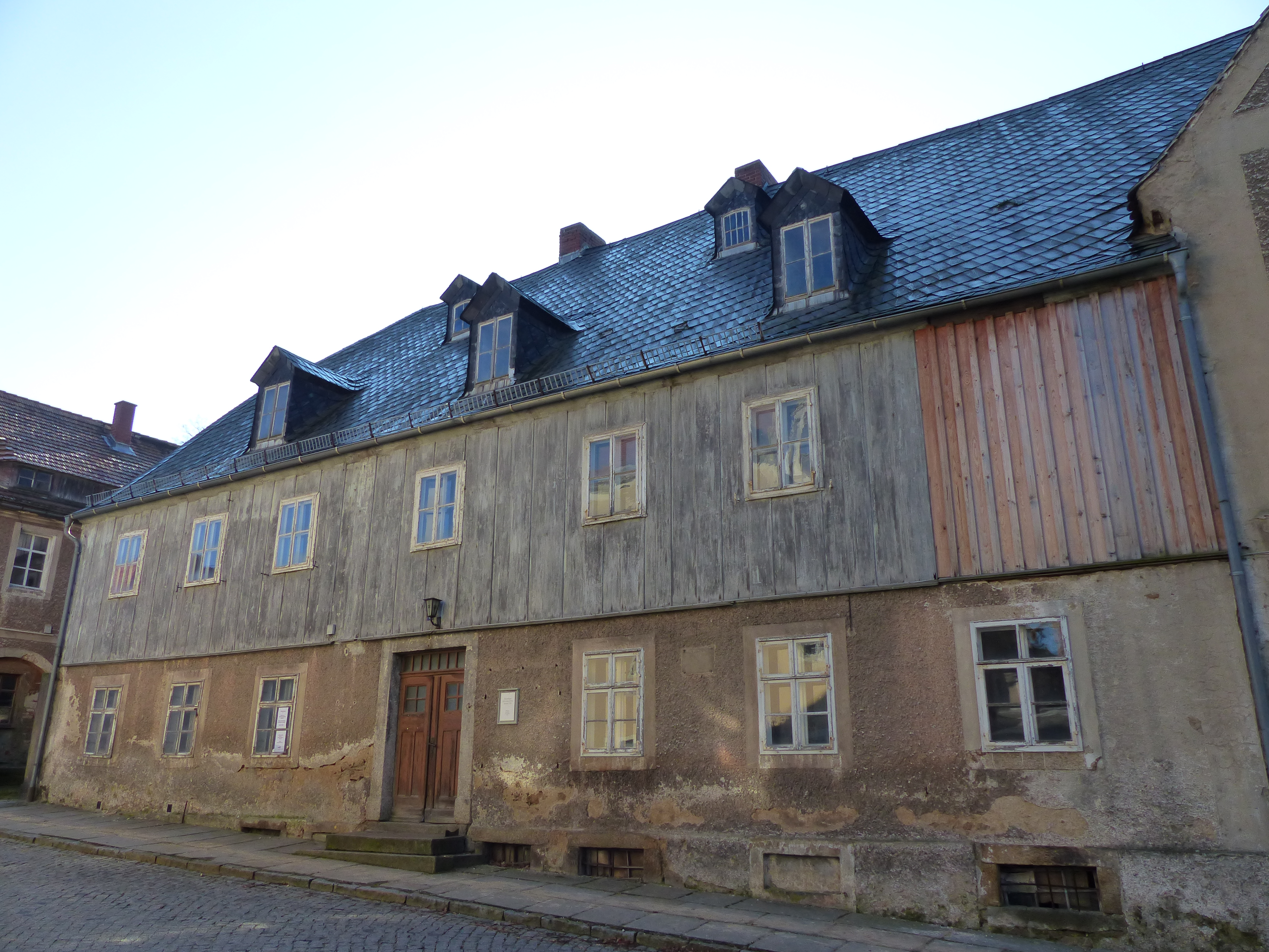 Denkmalgeschütztes Gebäude, Zinzendorfplatz 7, Kleinwelka bei Bautzen